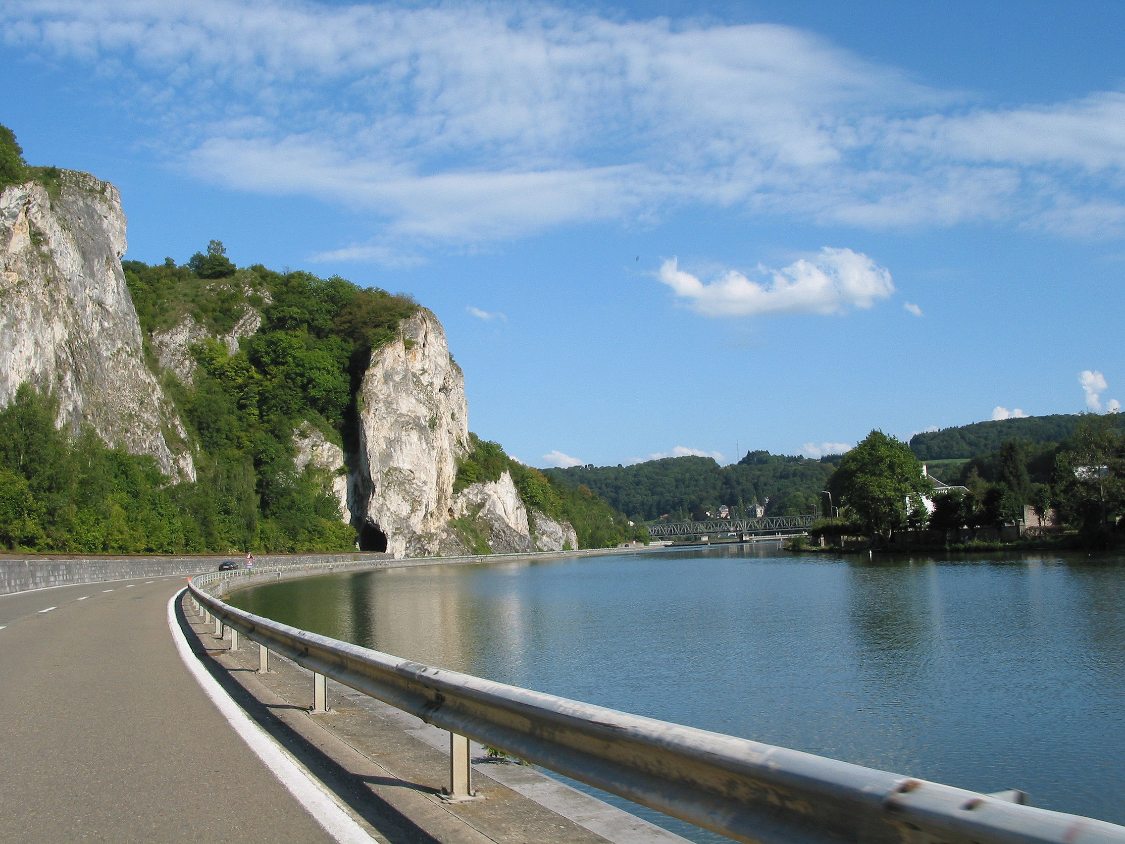 Anseremme (Belgique), au lieu-dit Monia - Le tunnel de la ligne de chemin de fer 154 (Dinant - Givet), la Meuse et le pont du chemin de fer.